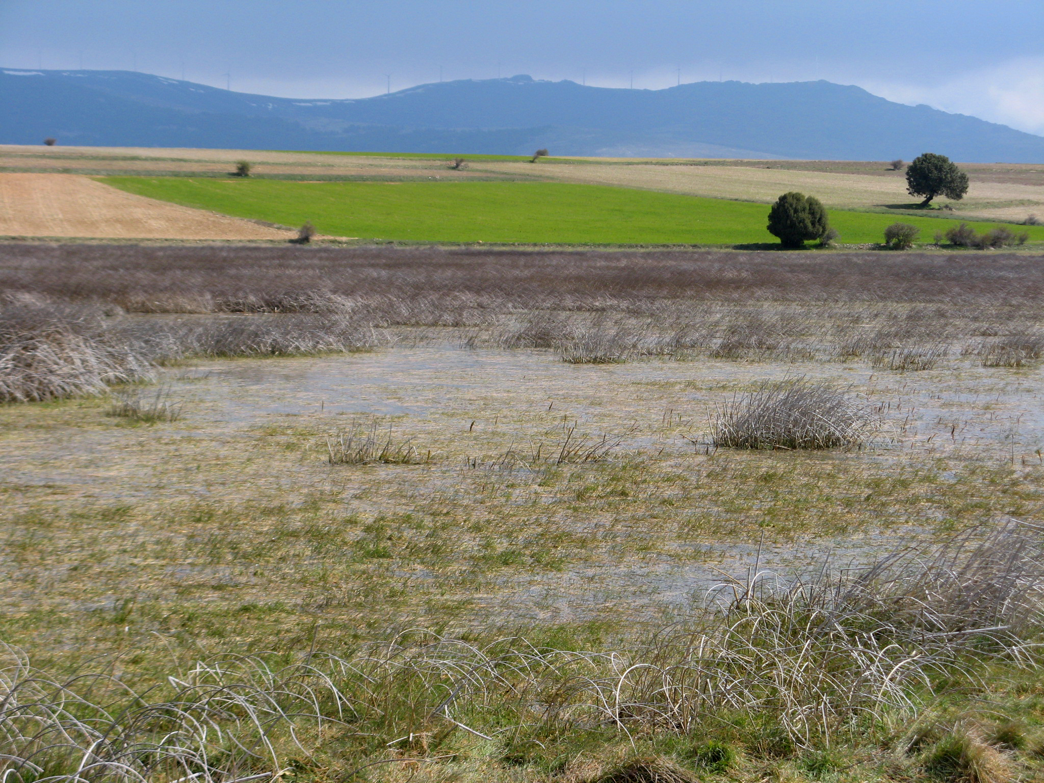 Sabinares de Ciria-Borobia This is a photography of a Site of Community Importance in Spain with the ID: ES4170056. Natura2000 entry, EEA entry